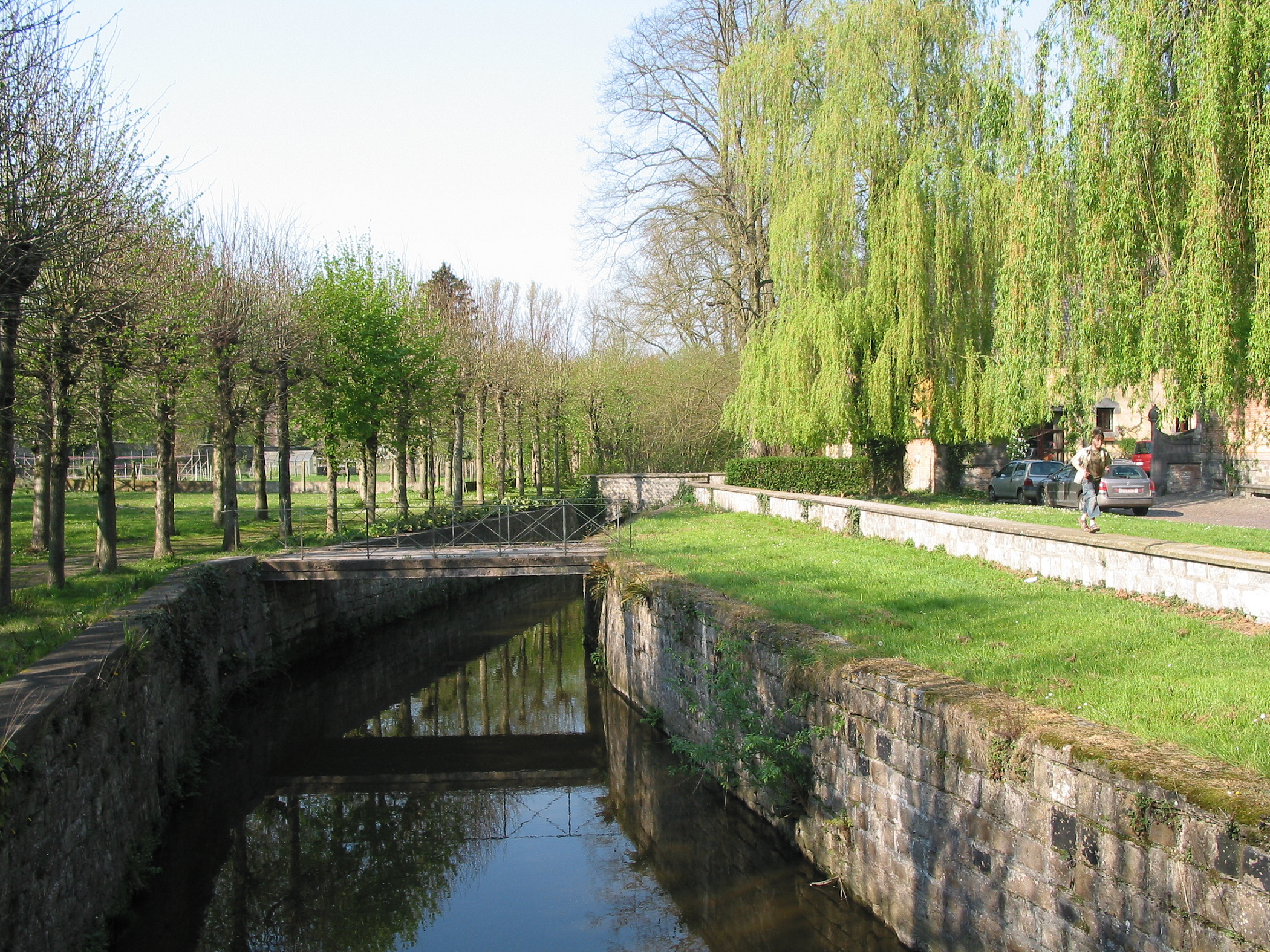 Saint-Denis, section canalisée de la rivière Obrechoeuil traversant l'abbaye de Saint-Denis-en-Broqueroie.